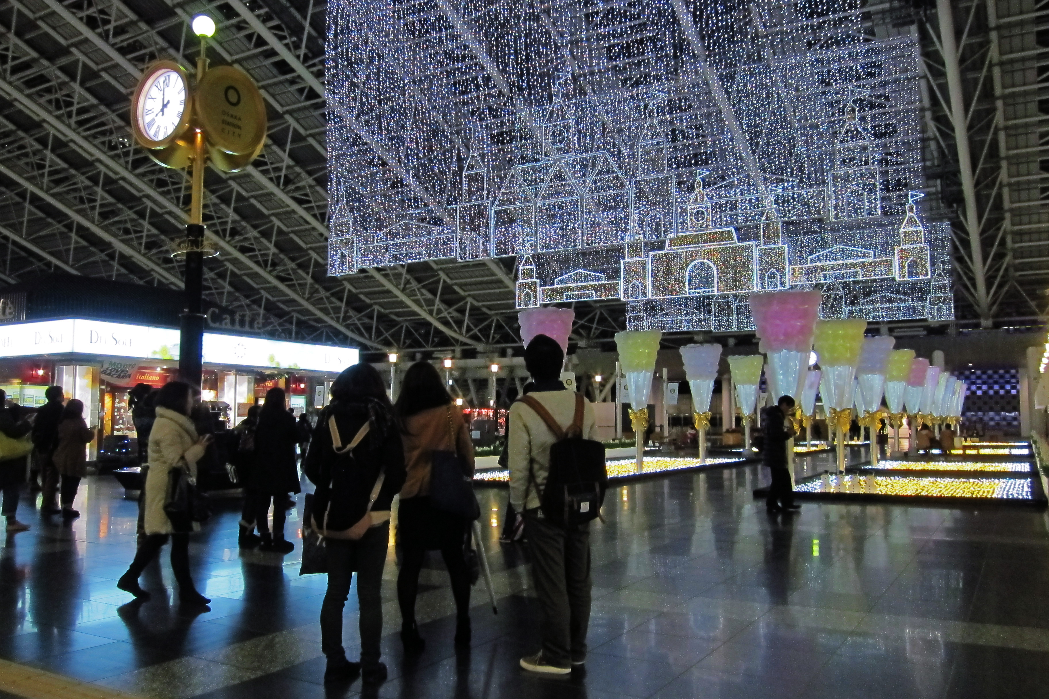 Christmas Osaka Station City (大阪ステーションシティ), Osaka, Osaka prefecture, Japan